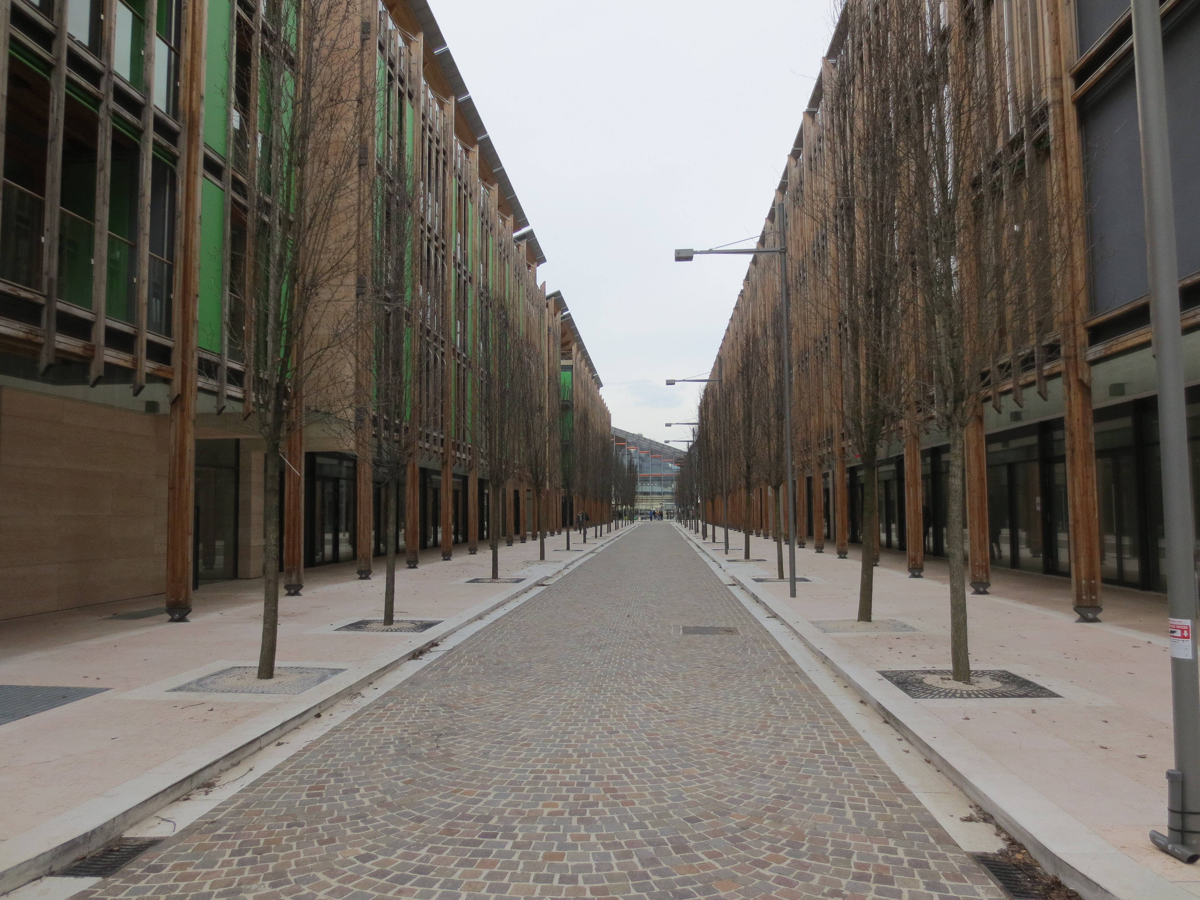 Vista del quartiere circostante il Museo delle Scienze di Trento (sullo sfondo il museo).